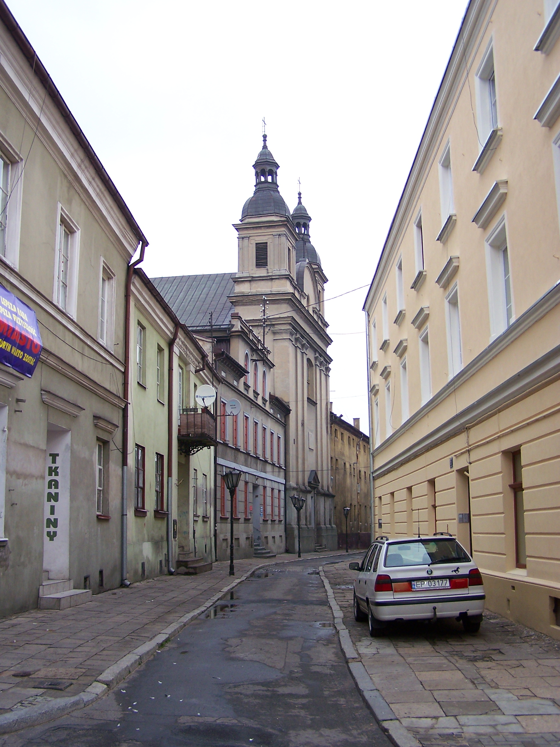 Piaristenkloster in Piotrków Trybunalski (Polen). Heute gibt es hier die evangelische Kirche.